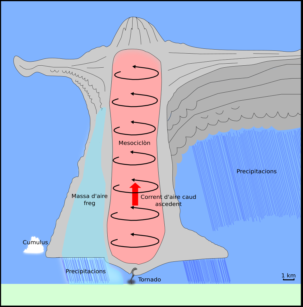 Esquèma generau d'un tornado e dau mesociclòn associat.